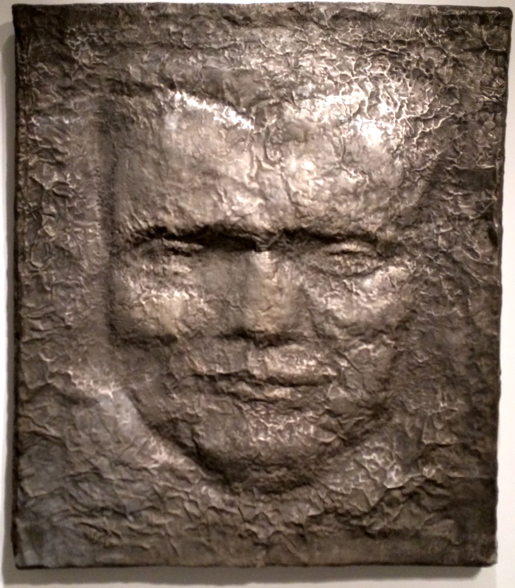 Srpskohrvatski / српскохрватски: Tito, izložak na "Retrospektivi Vojina Bakića" u MSU Zagreb